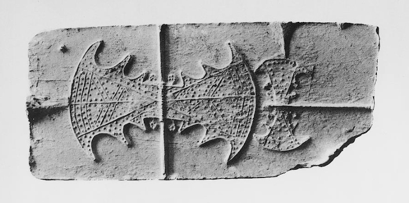 Fotografie des Abdruckes einer Gussform aus Schiefer. Gefunden im Oktober 1899 nordwestlich des Ortes Palekastro.